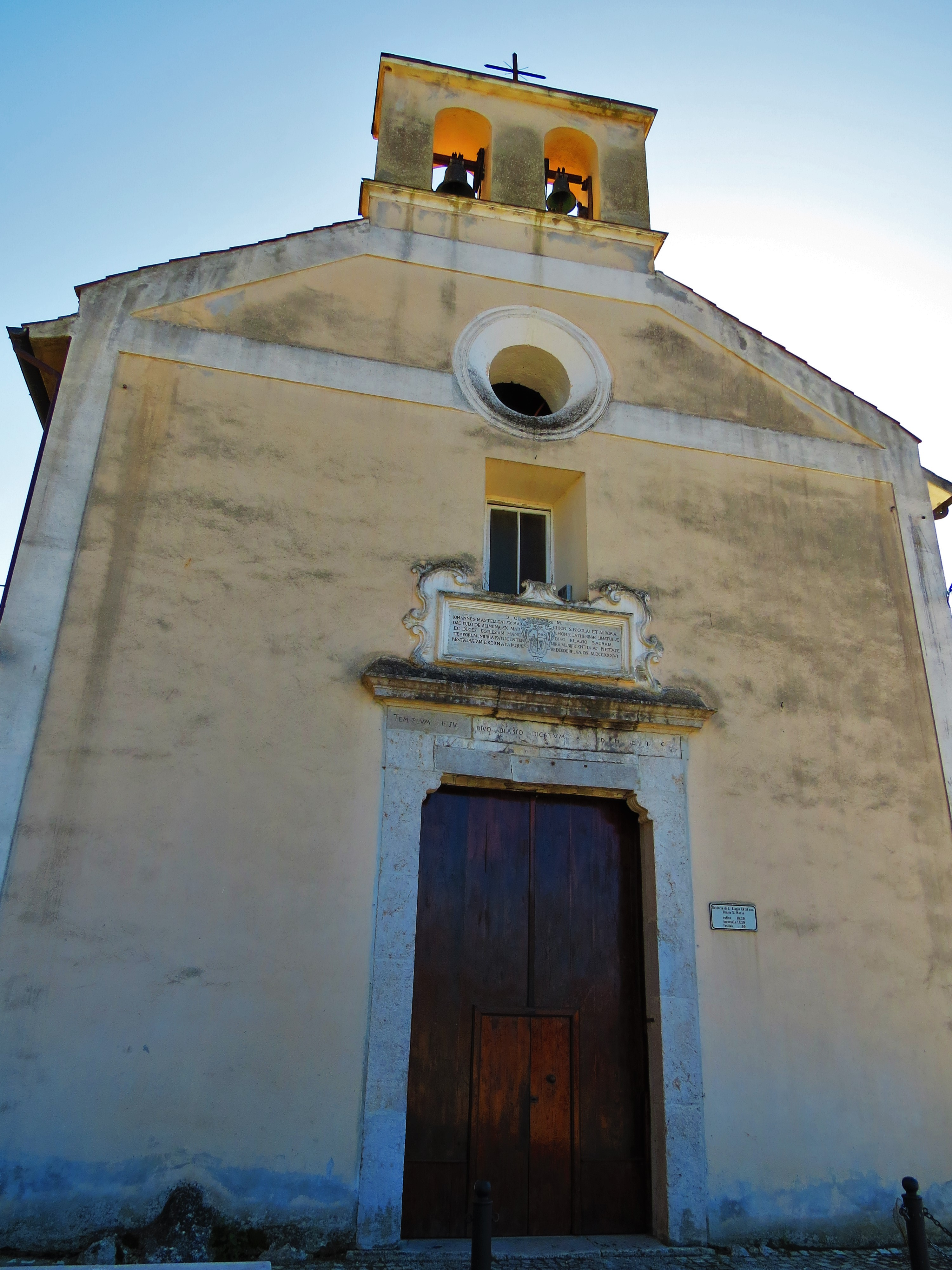 Limatola